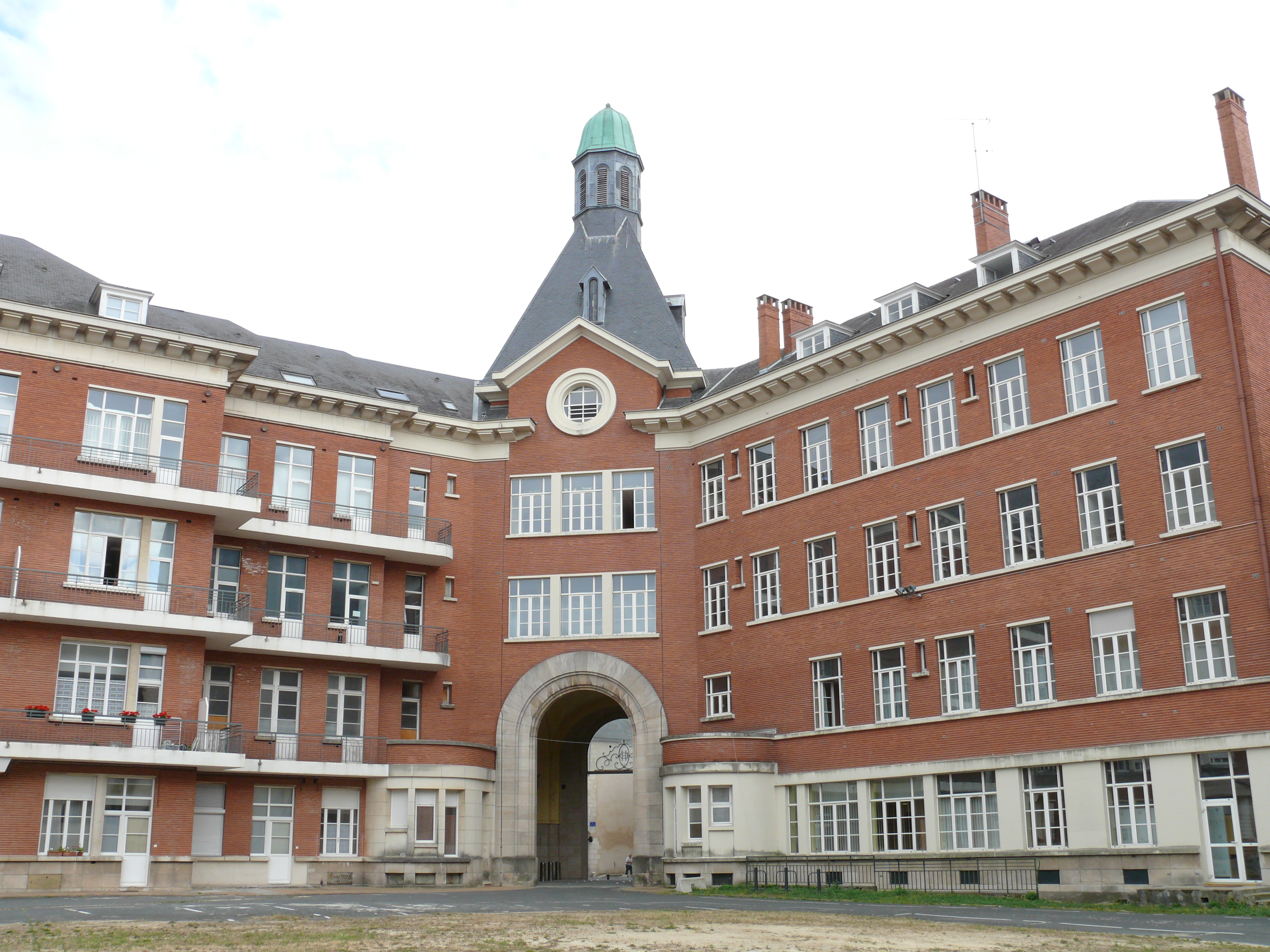 Bourges - Hôtel-Dieu - Bâtiments modernes